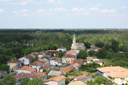 Sanguinet